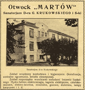 Sanatorium Kurukowskiego w Otwocku - obecnie liceum Słowackiego